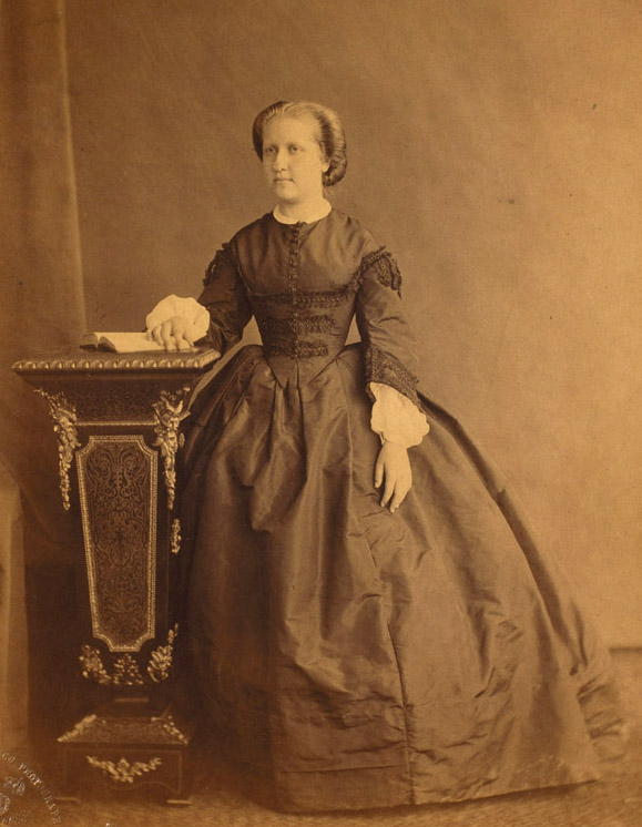 Isabel, Princess Imperial of Brazil.